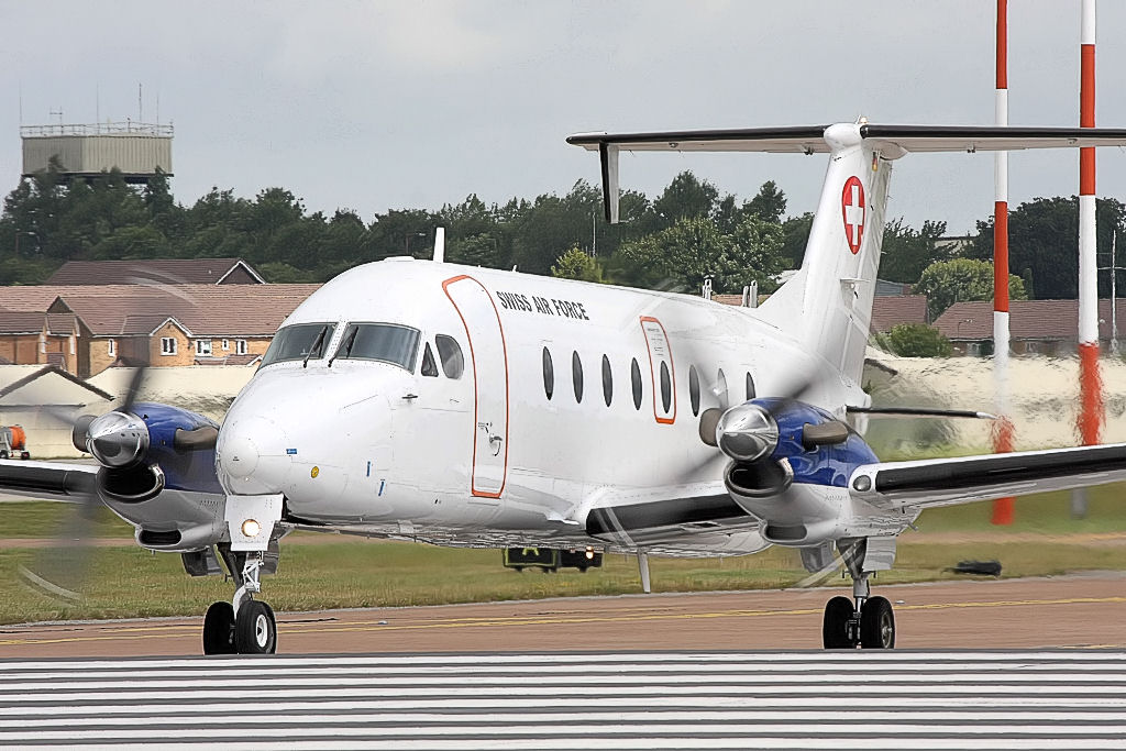 Beech 1900d - RIAT 2008